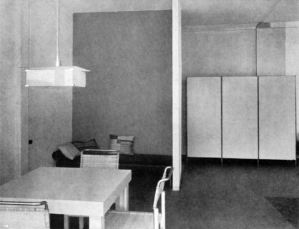 Wnętrze pokoju dziennego. Meble zaprojektowane przez Jo Vineckyego.